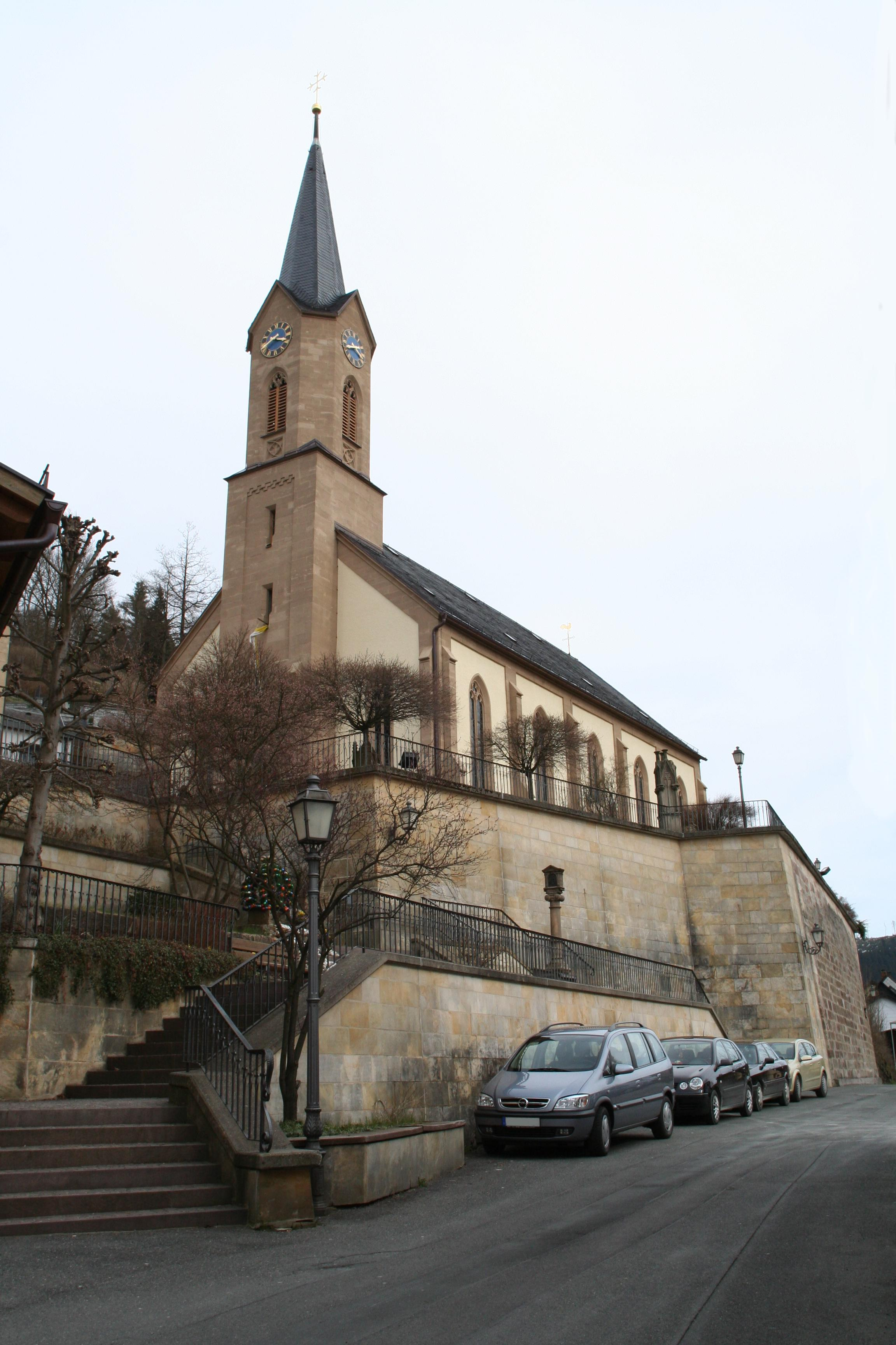 Wallenfels im Landkreis Kronach, Katholische Kirche St.Thomas